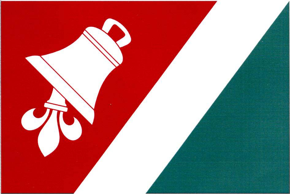 Vlajka obce Chudíř